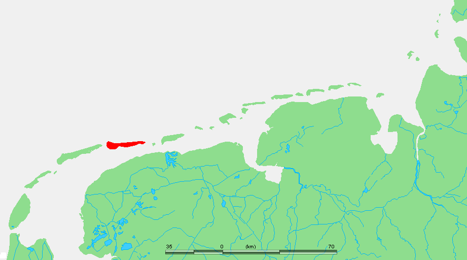 Wadden - Ameland.PNG